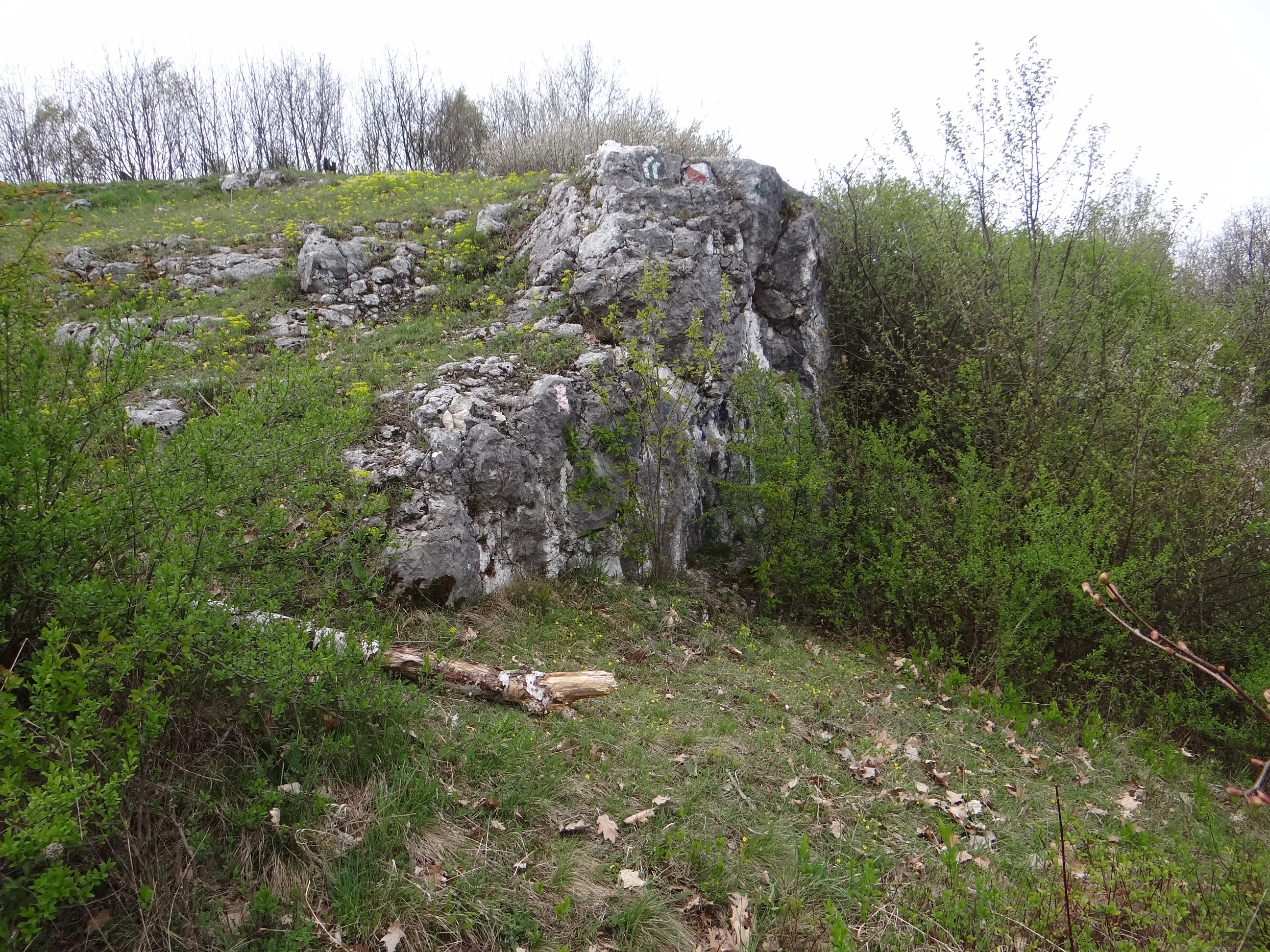 Wzgórze Wielkanoc w Tyńcu w Krakowie